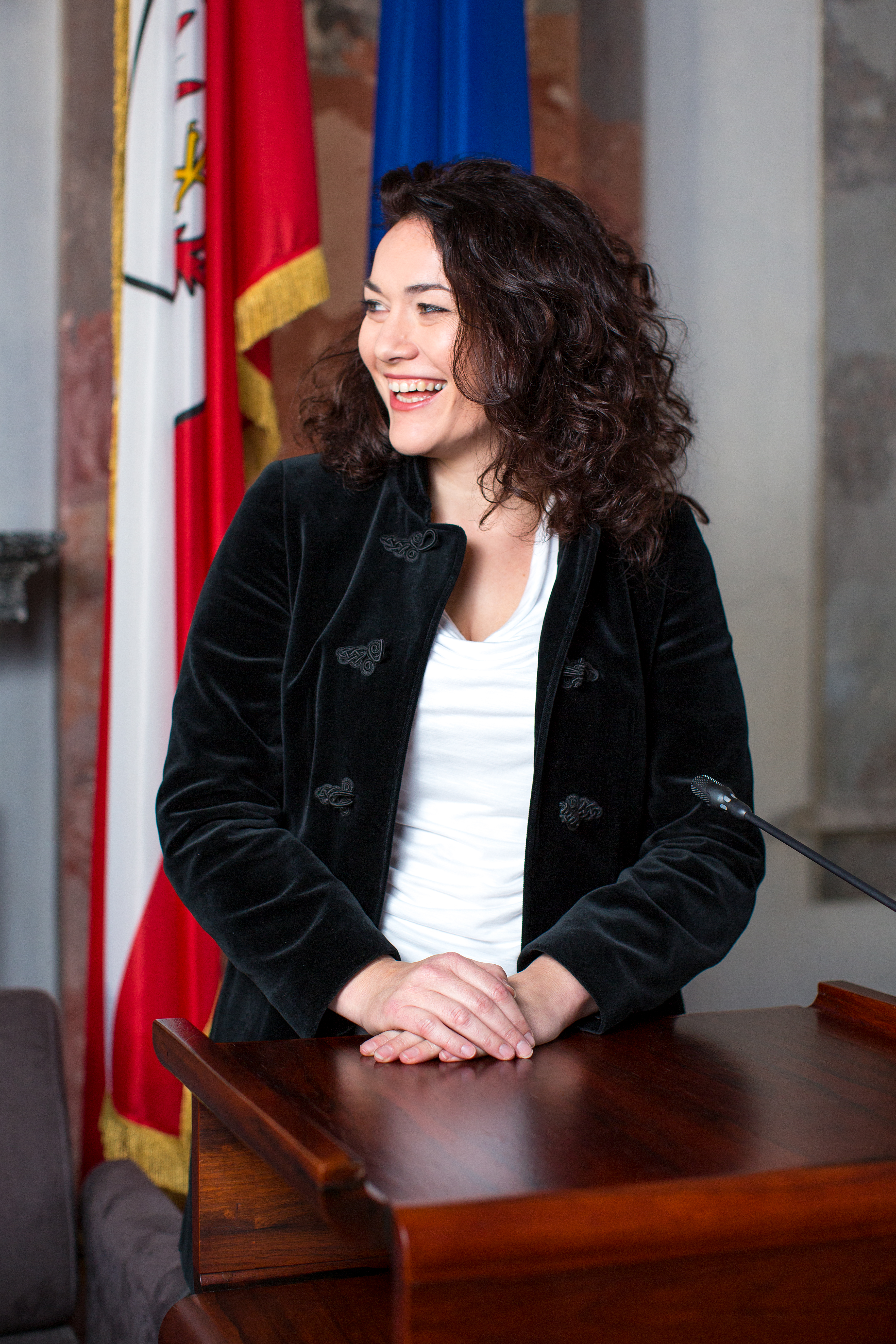 Ingrid Felipe im Tiroler Landtag (Foto: Rottensteiner/Land Tirol)